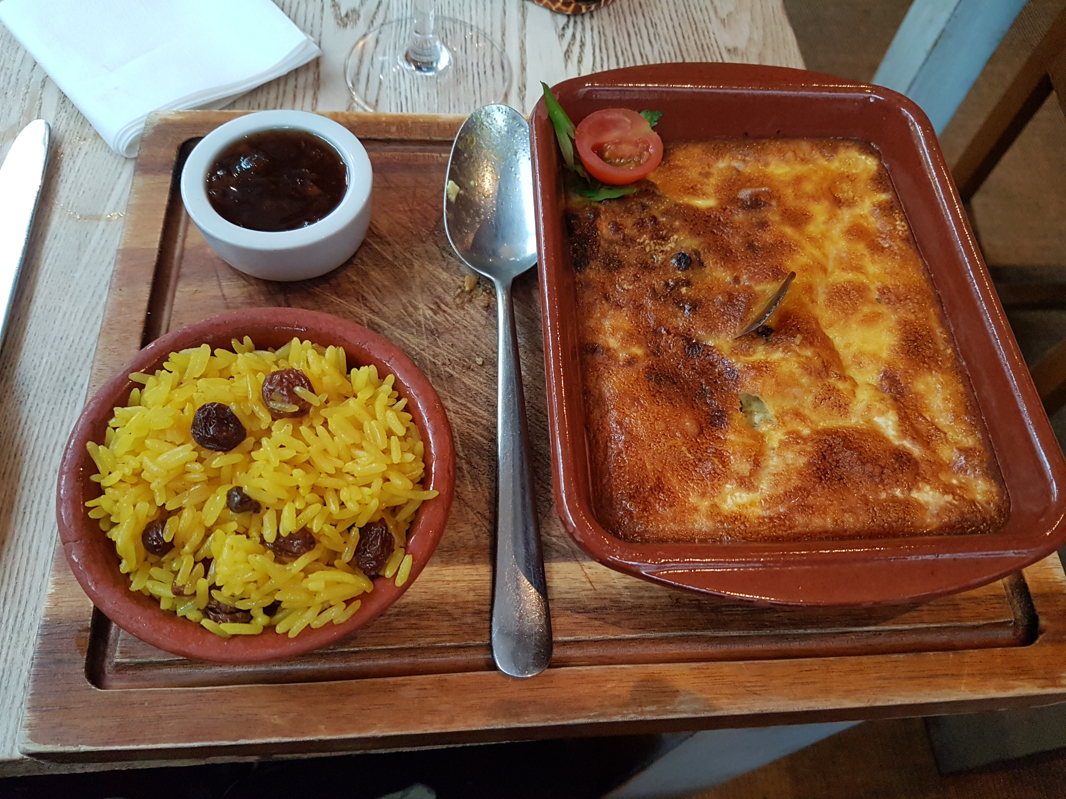 Bobotie meal